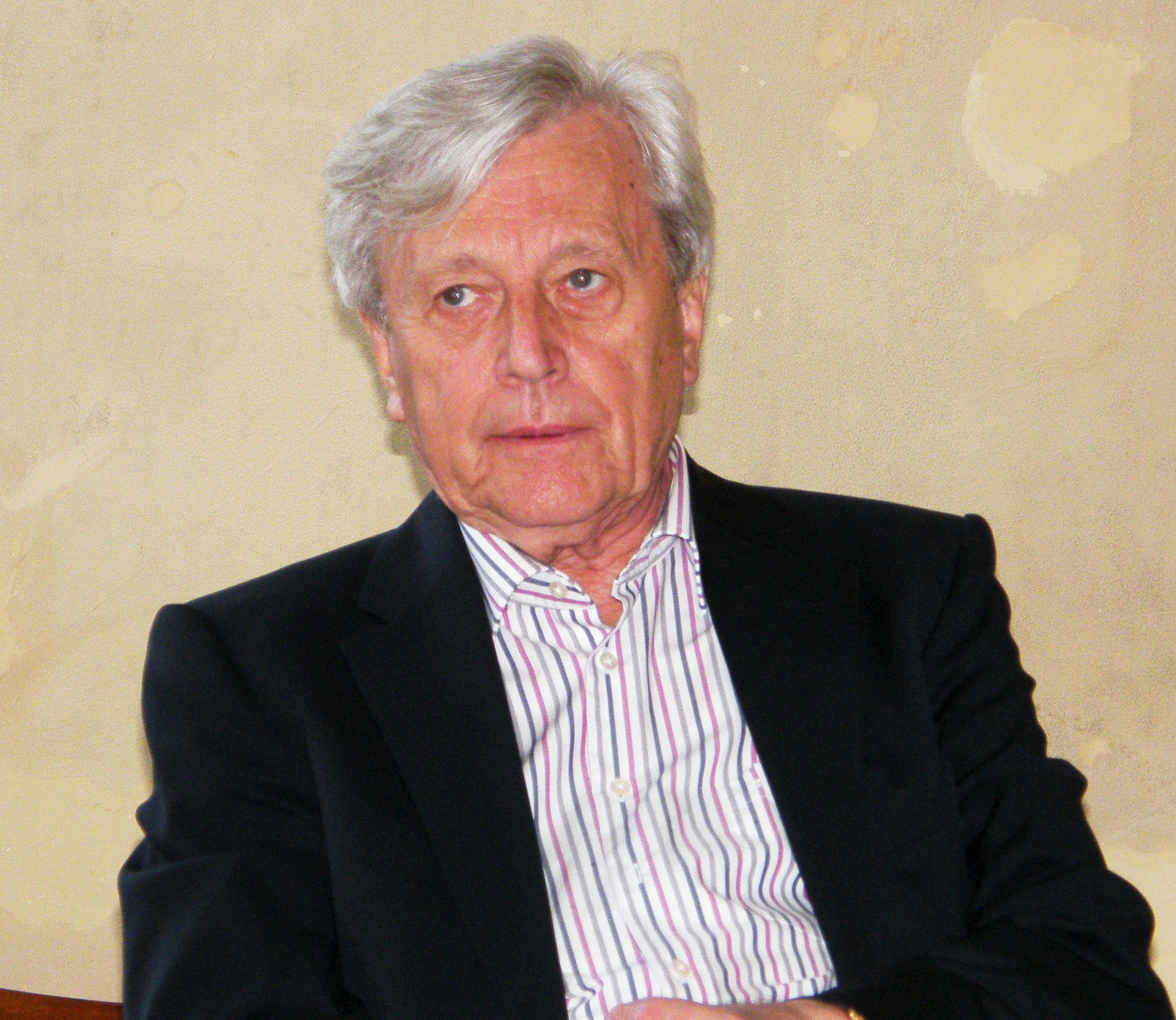 Sieghart Dittmann beim Lasker-Treff in Berlin am 28. März 2012